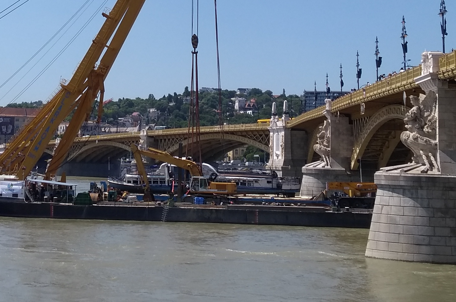 2019 június 11 14:08:05 A kiemelt Hableány roncsa